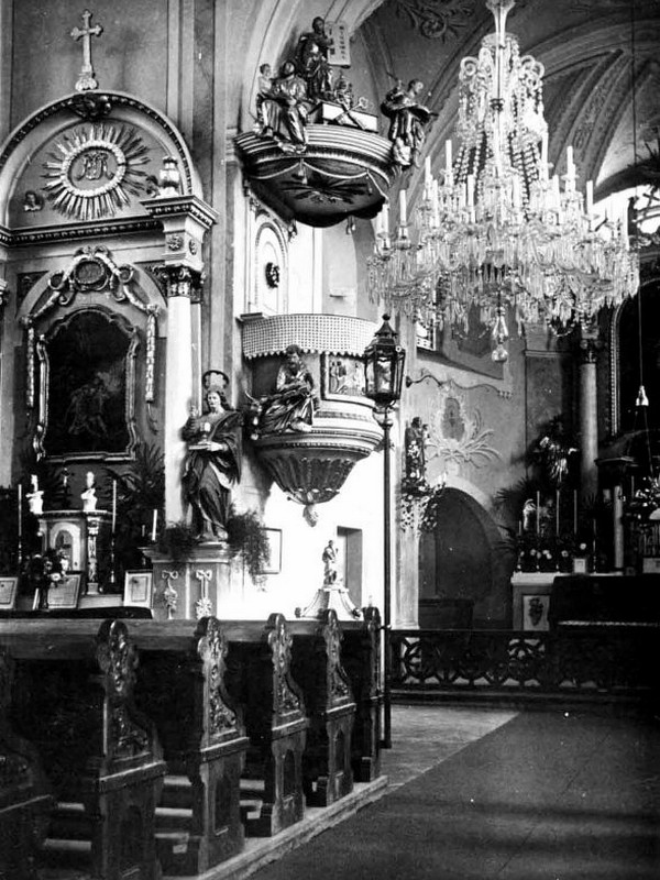 Dobový snímek kostela svatého Martina ve Brtníkách